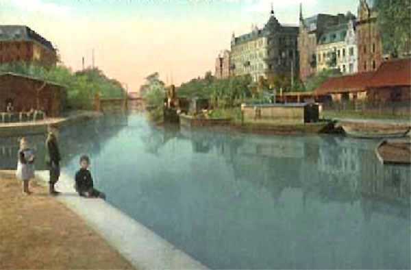 Nieistniejący port w Gliwicach na Kanale Kłodnickim